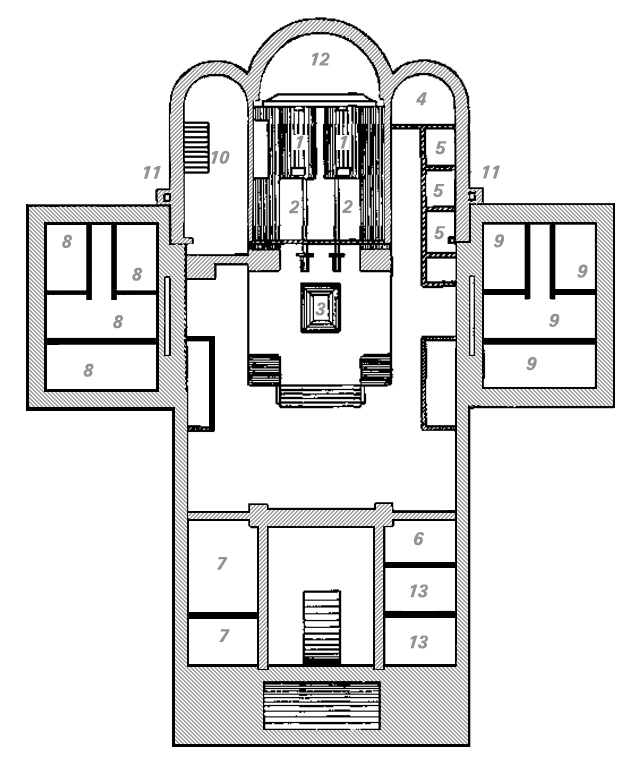 Первый московский крематорий, план кремационного отделения (полуподвальный этаж): печи подвижные рельсы лифт секционная душевая и комната отдыха для персонала комната врача мастерские кабинки морга то же для заразных лестница в подвальный этаж дымоход место для топлива туалеты Перерисованная картинка, оргинал — Большая медицинская энциклопедия 1930 года